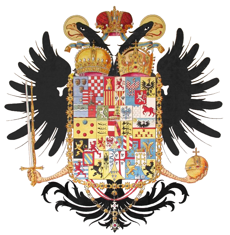 Großes Wappen seiner Majestät Joseph II. von Gottes Gnaden römischer Kaiser allzeit Mehrer des Reiches etc. etc.